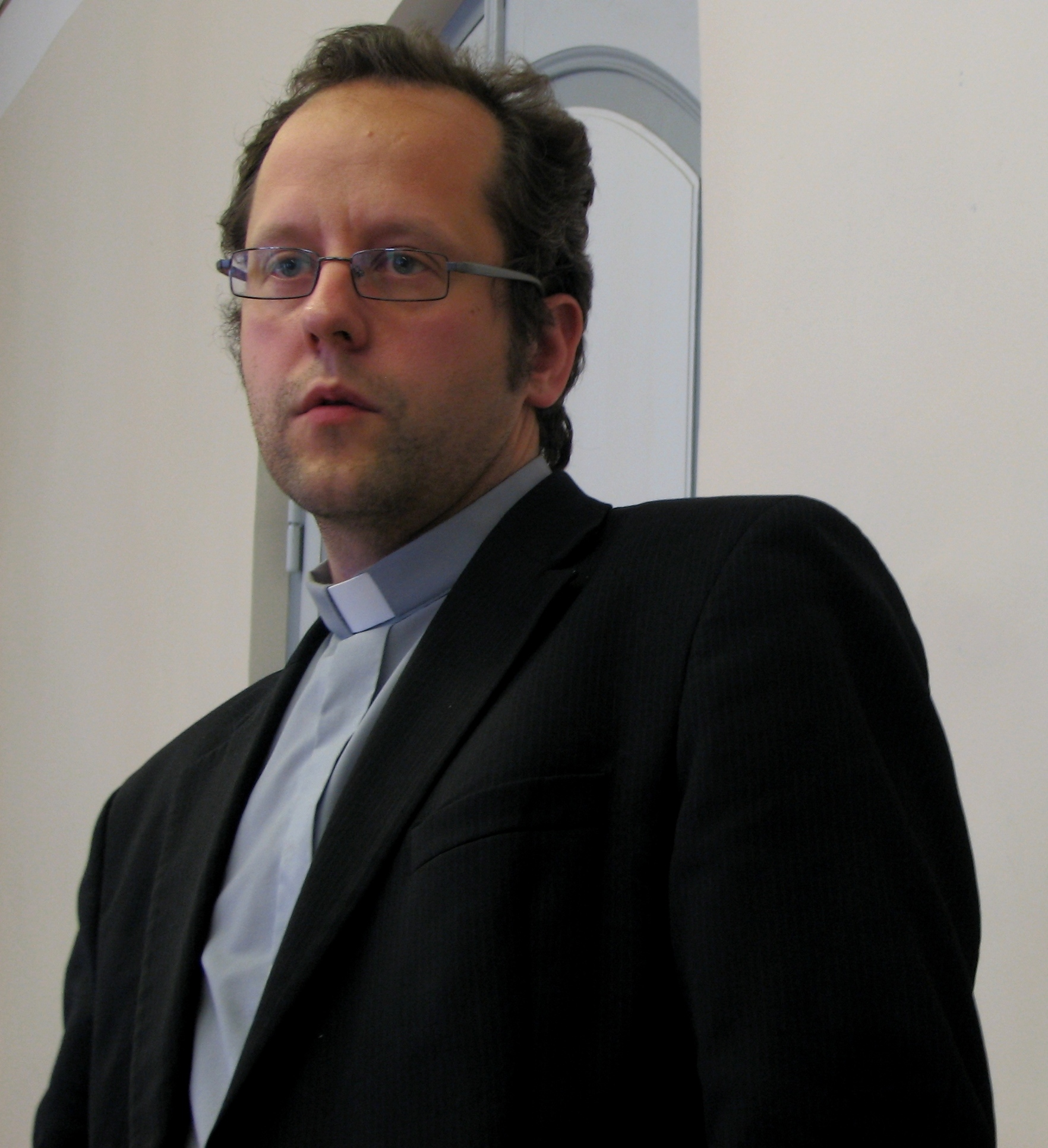 Ove Sander